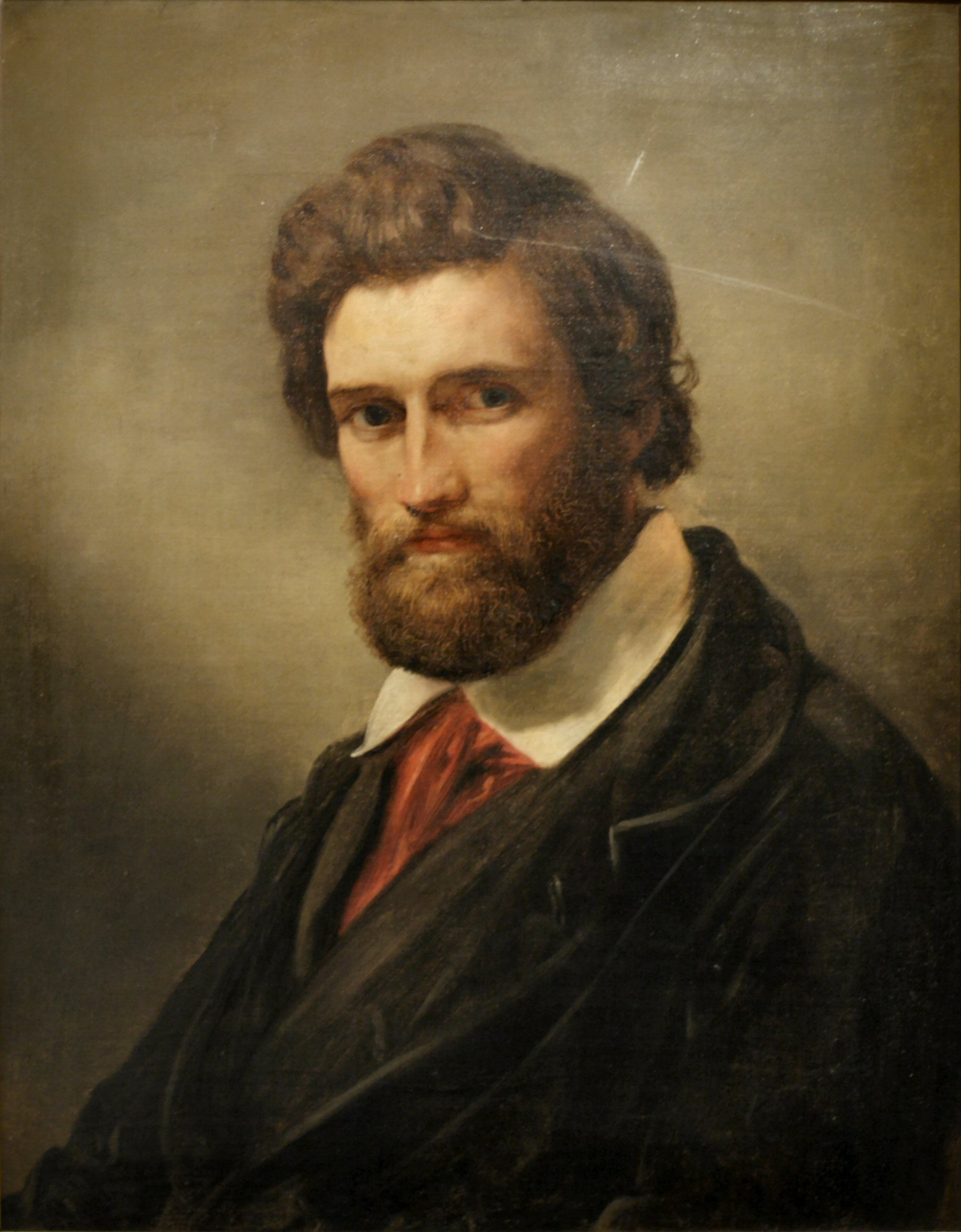 maleri af Elisabeth Jerichau Baumann: Harald Konradsen 65 x 61 cm.